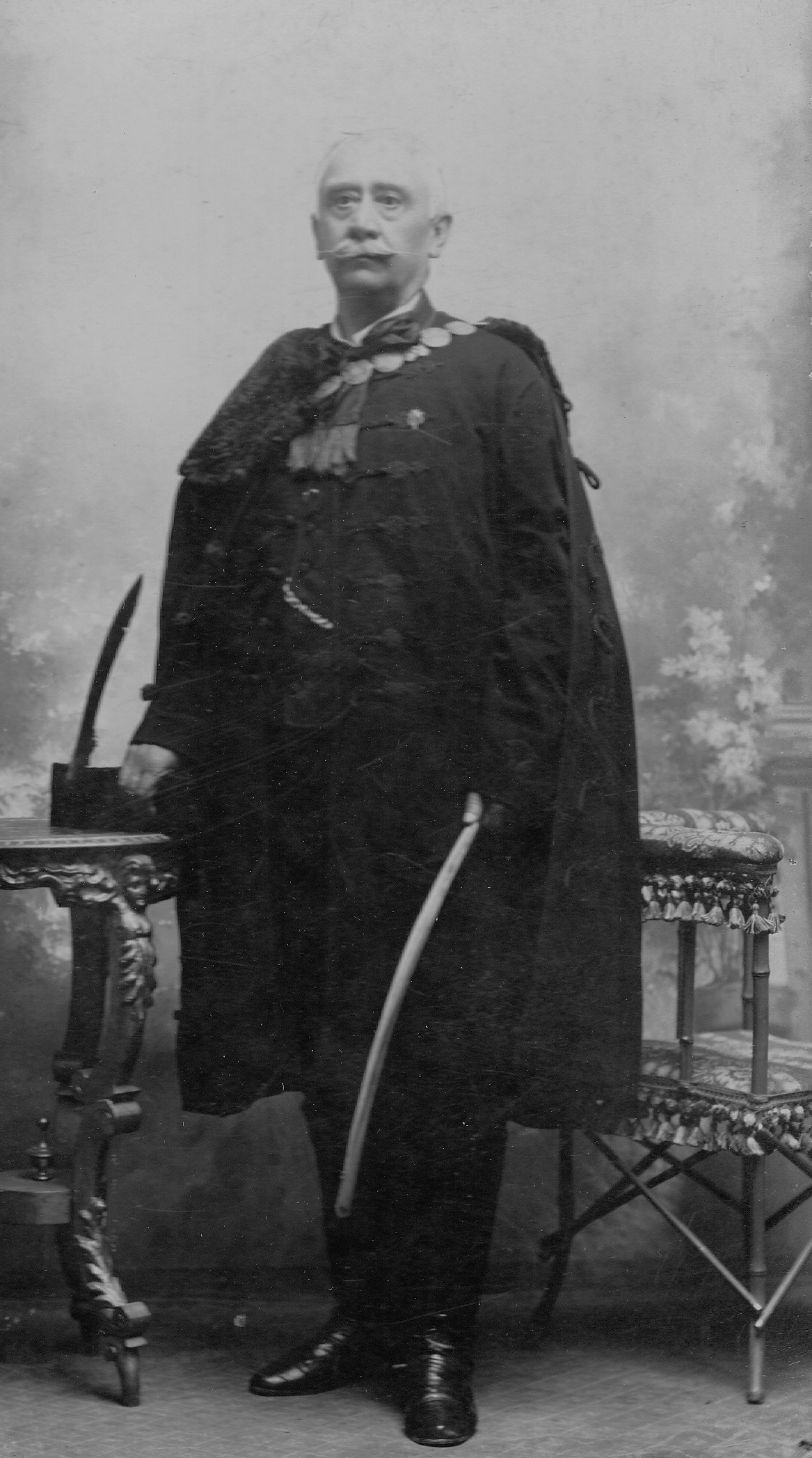 Egyházasbüki Dervarics Imre (1842–1910), politikus, alszolgabíró, "Zalavármegyei Gazdasági Egyesület" tagja, a zalamegyei nemesi és alapítványi választmány tagja.